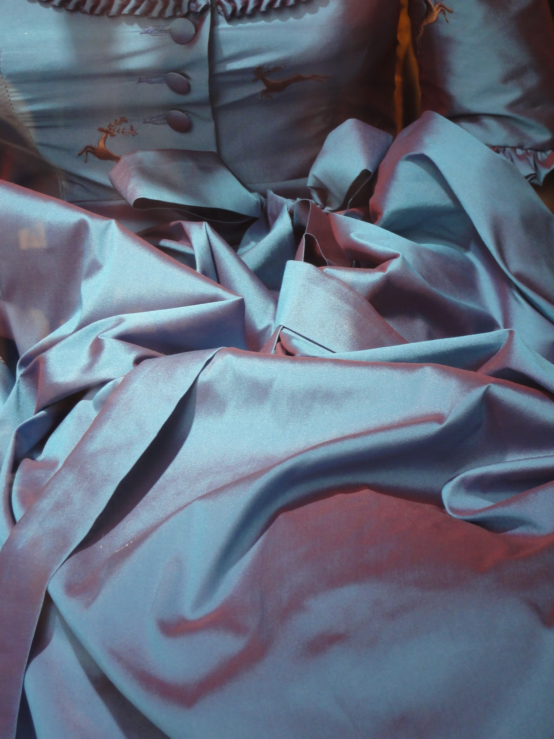 Austria, Bundesland Salzburg, Stadtgemeinde Salzburg, Judengasse